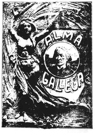 Alma Gallega, 1910.